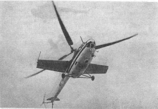 Uskrzydlona wersja SM-1